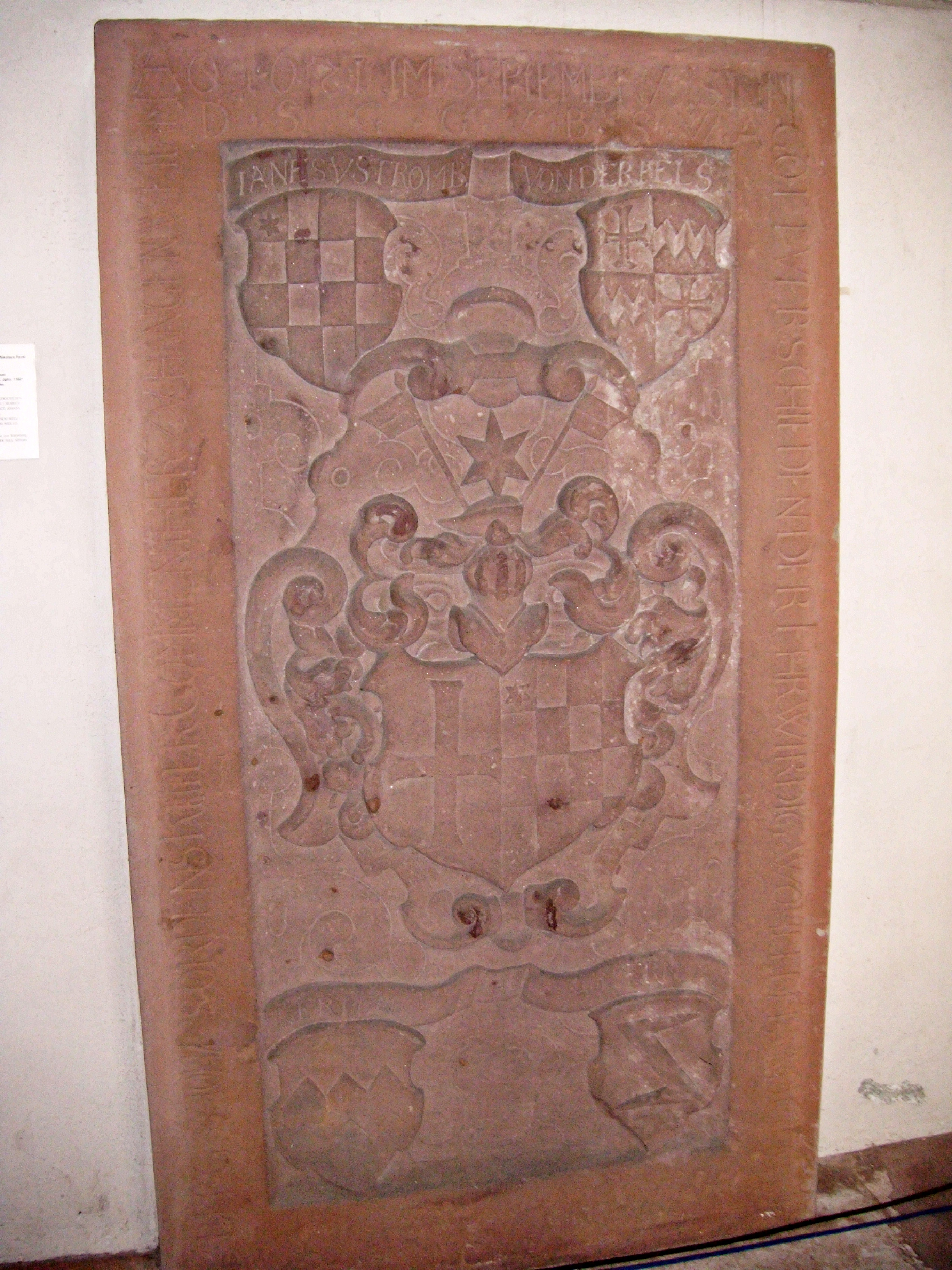 Wappenepitaph des Johanniterkomturs (=Malteser) von Hangen-Weisheim, Heinrich Nikolaus Faust von Stromberg (+ 1621), Stadtmuseum Worms